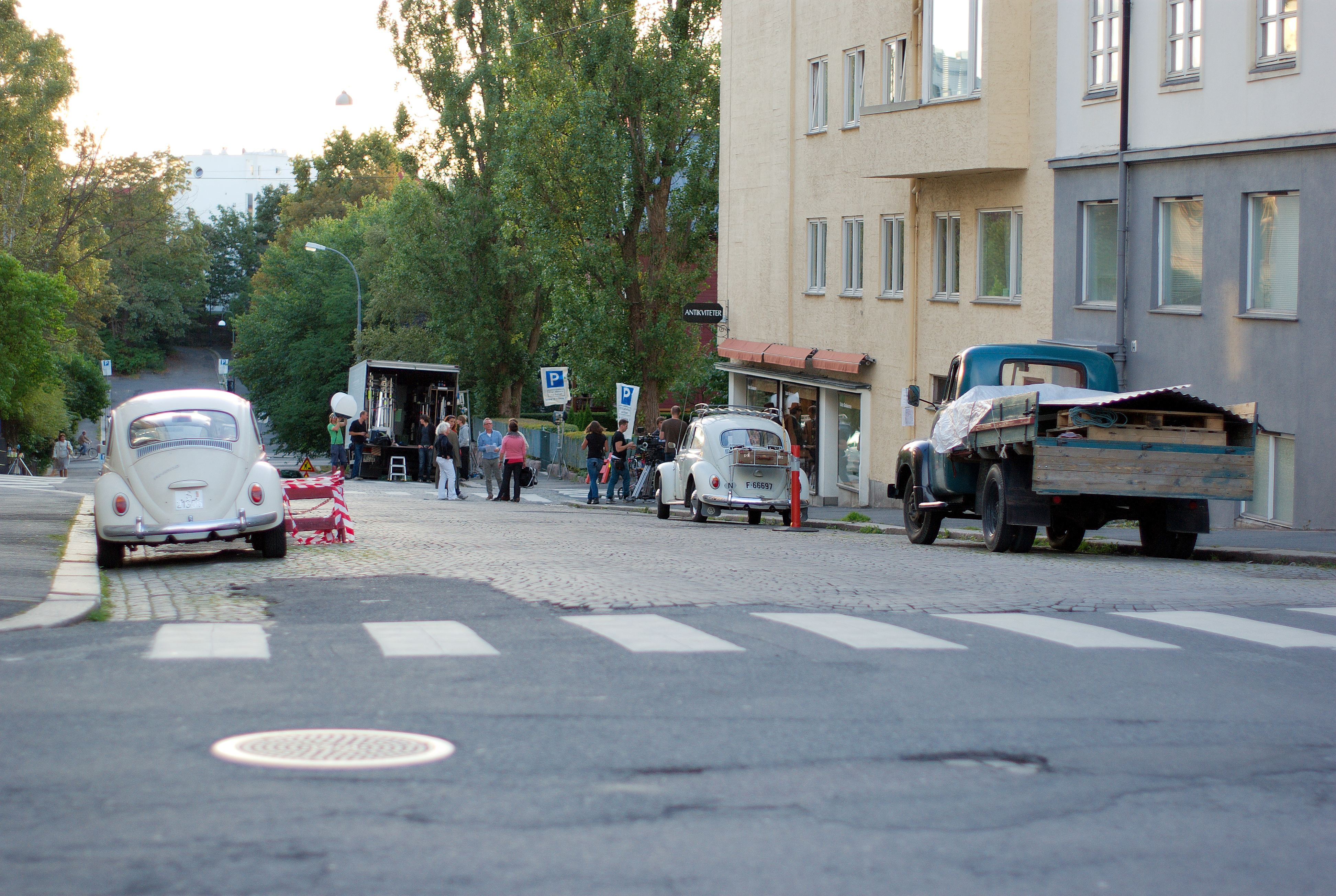 The movie set of Maskeblomstfamilien. Eilert Sundts gate (Bondebakken) in Oslo.